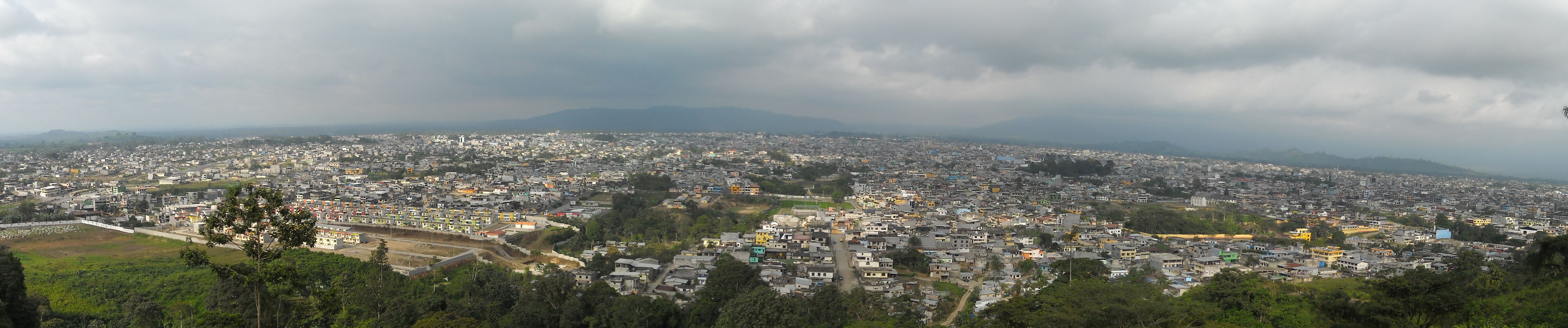 View of Santo Domingo (Ecuador) from Cerro Bombolì